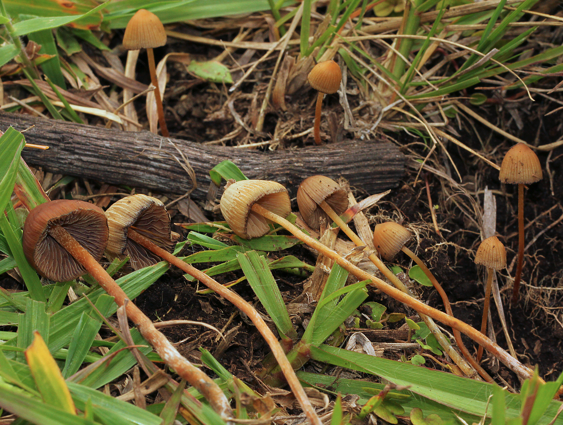 Psilocybe mexicana R. Heim